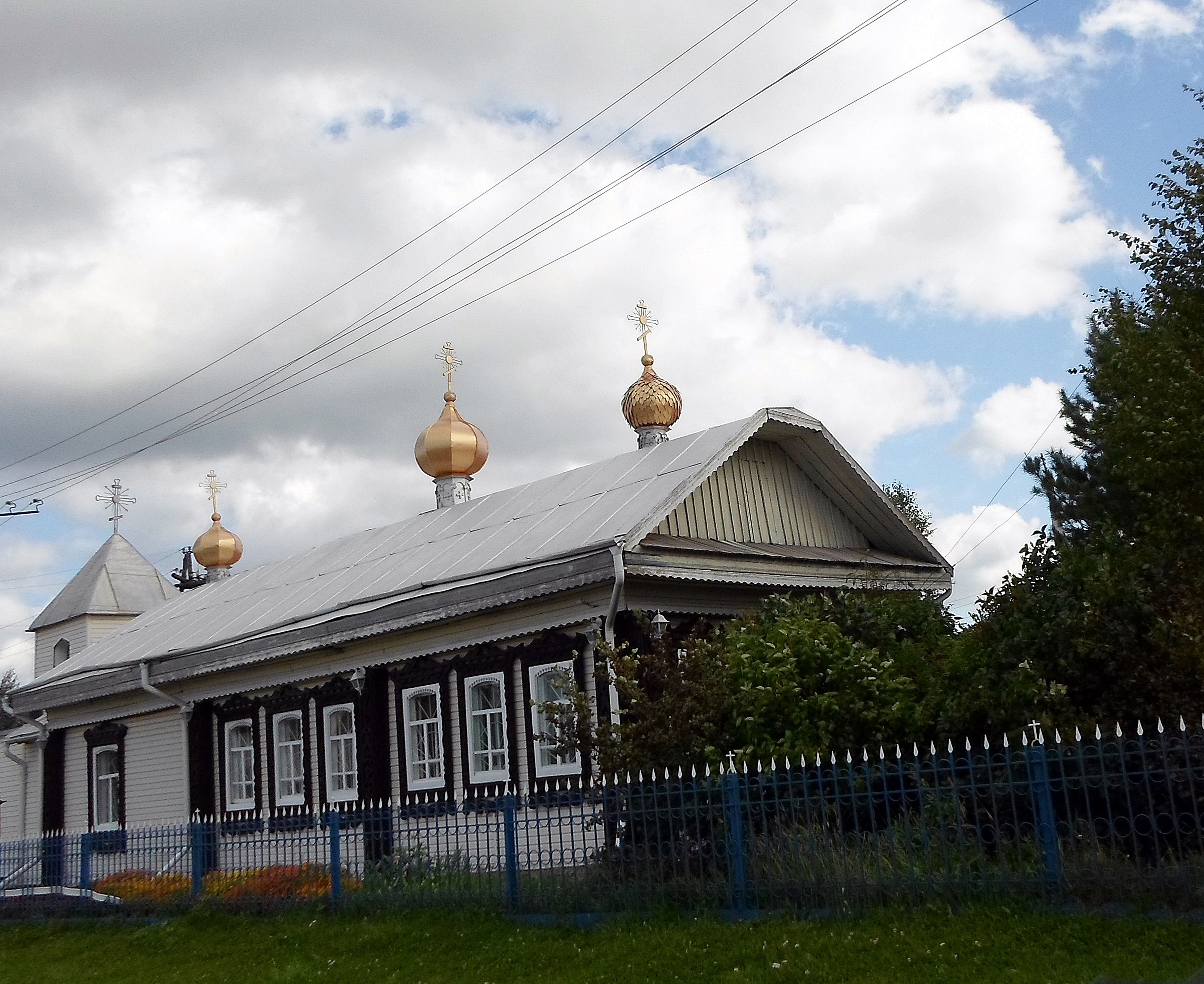 Никольская церковь в селе Большой Улуй. Большеулуйский район Красноярского края.